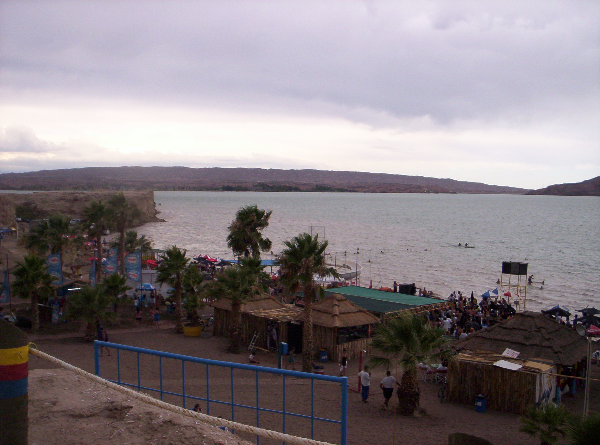 La playa privada de costamagna